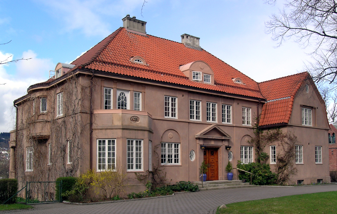 Klubbselskapet Harmoniens lokale, Sverres gate 4, Trondheim. Opprinnelig bygd som villa for skipsreder H.L. Bachke 1916. Arkitekt: Axel Guldahl d.e.